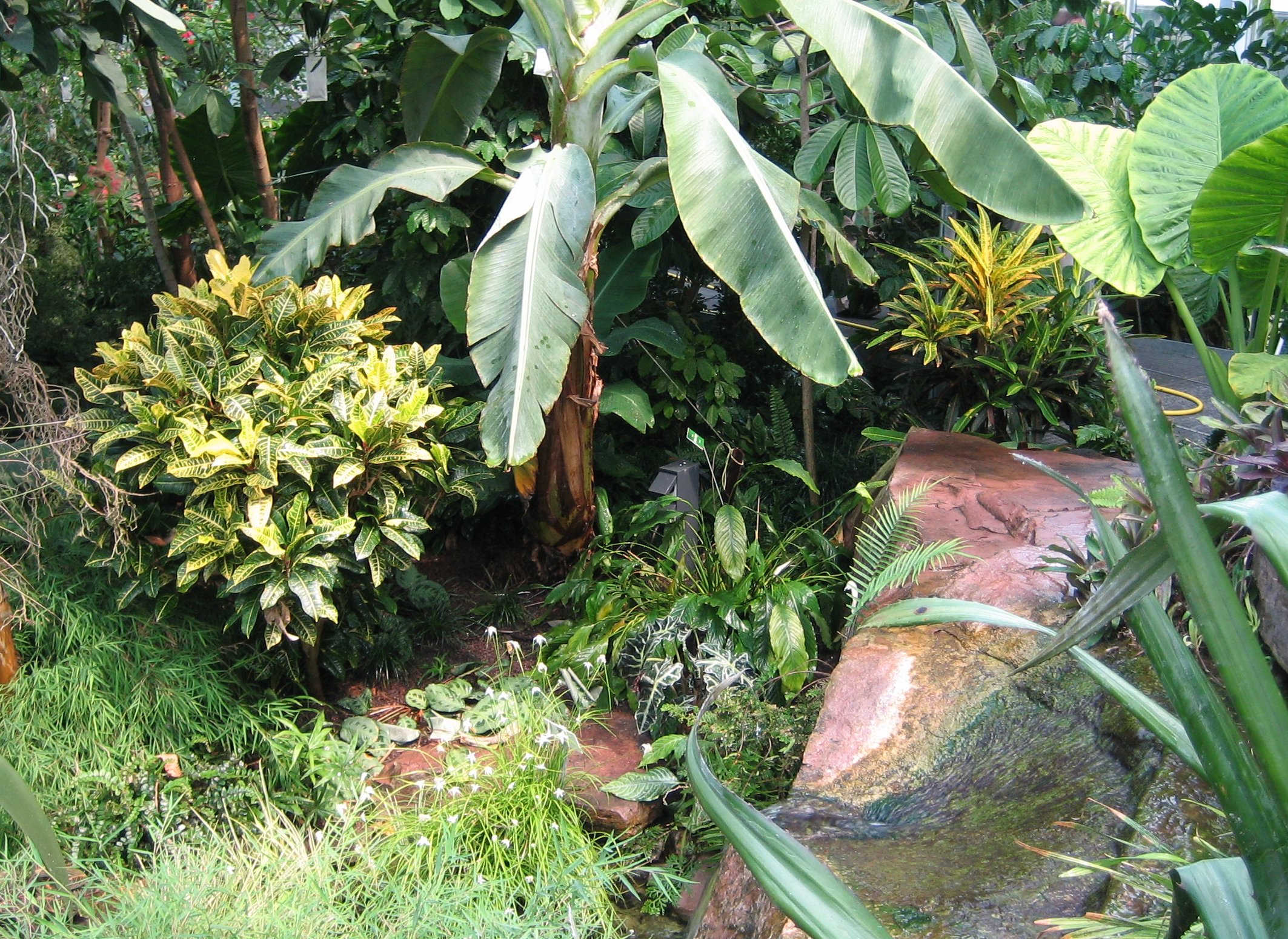 Botanischer Garten in Augsburg, Tropenpflanzen in der „Pflanzenwelt unter Glas“